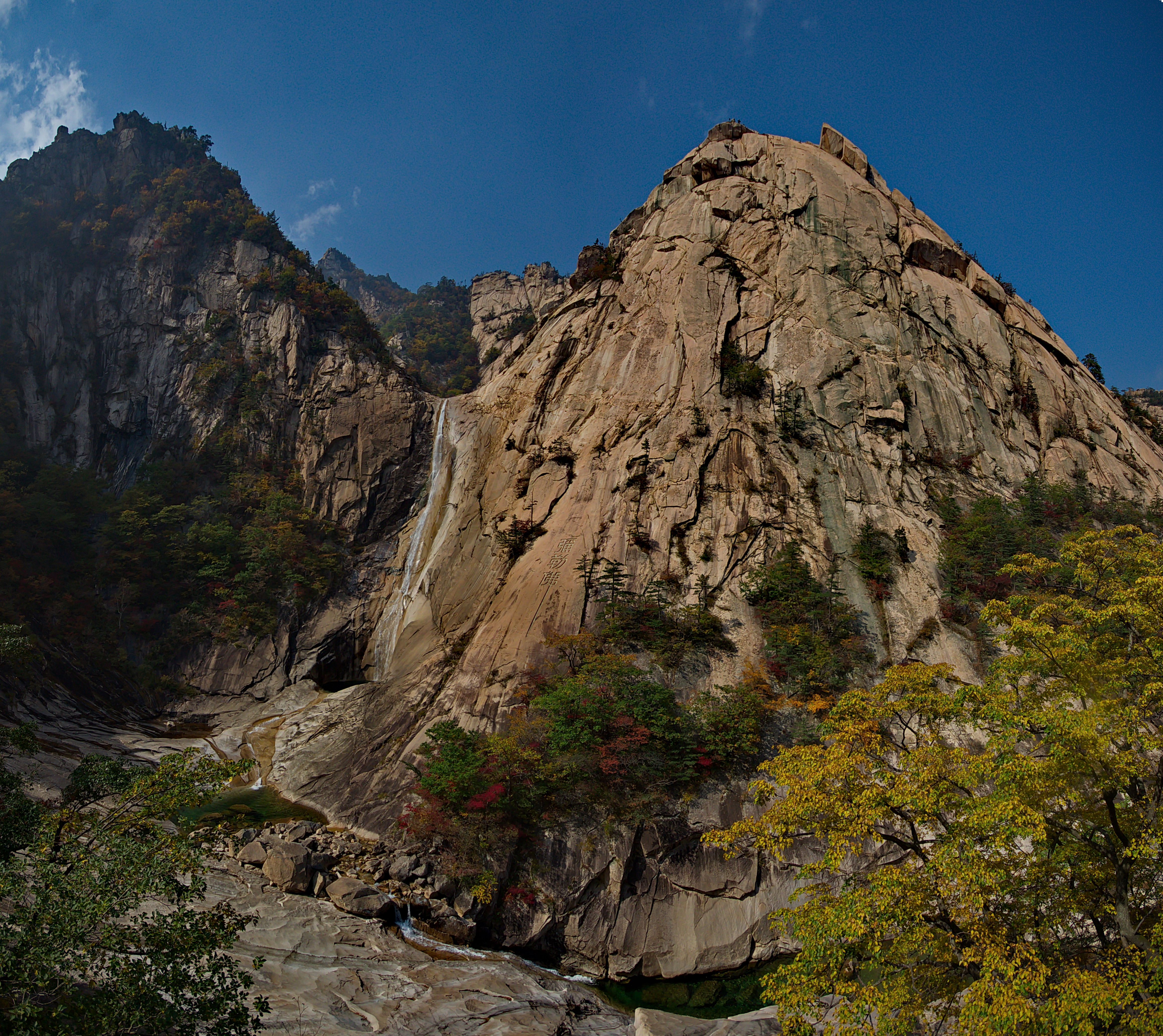 Nordkorea 2015 - Kumgang Gebirge - Kuryong Fasserfall